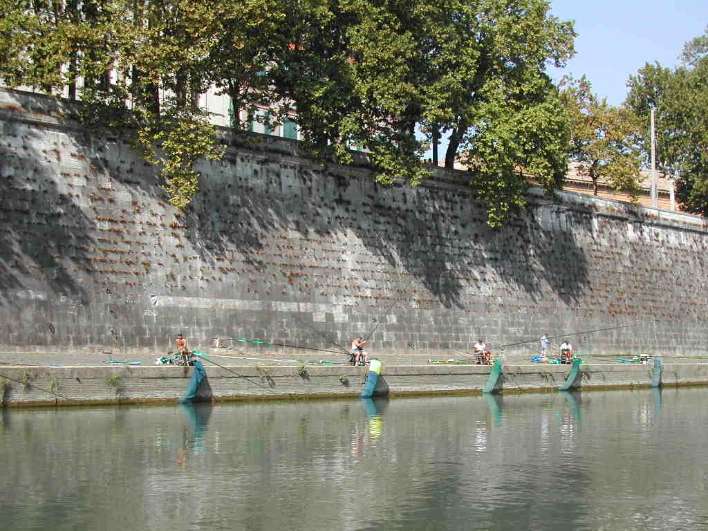 Roma, pescatori sul Tevere